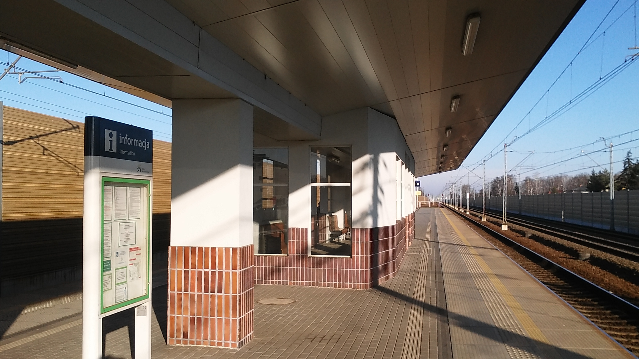 przystanek kolejowy Kobyłka - budynek przystanku, poczekalnia